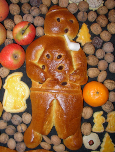 Dr Baselmann, Griitibänz, Grettimaa, Elgermaa oder Weckmann üs em Sack vum Nigelaüs alias Sammichlaus.